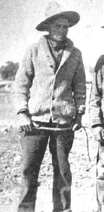 El Coronel Jose Maria Jaurietta